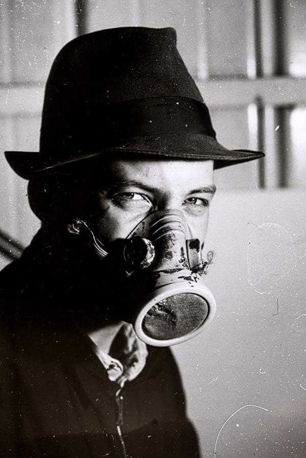 Phil Macquet